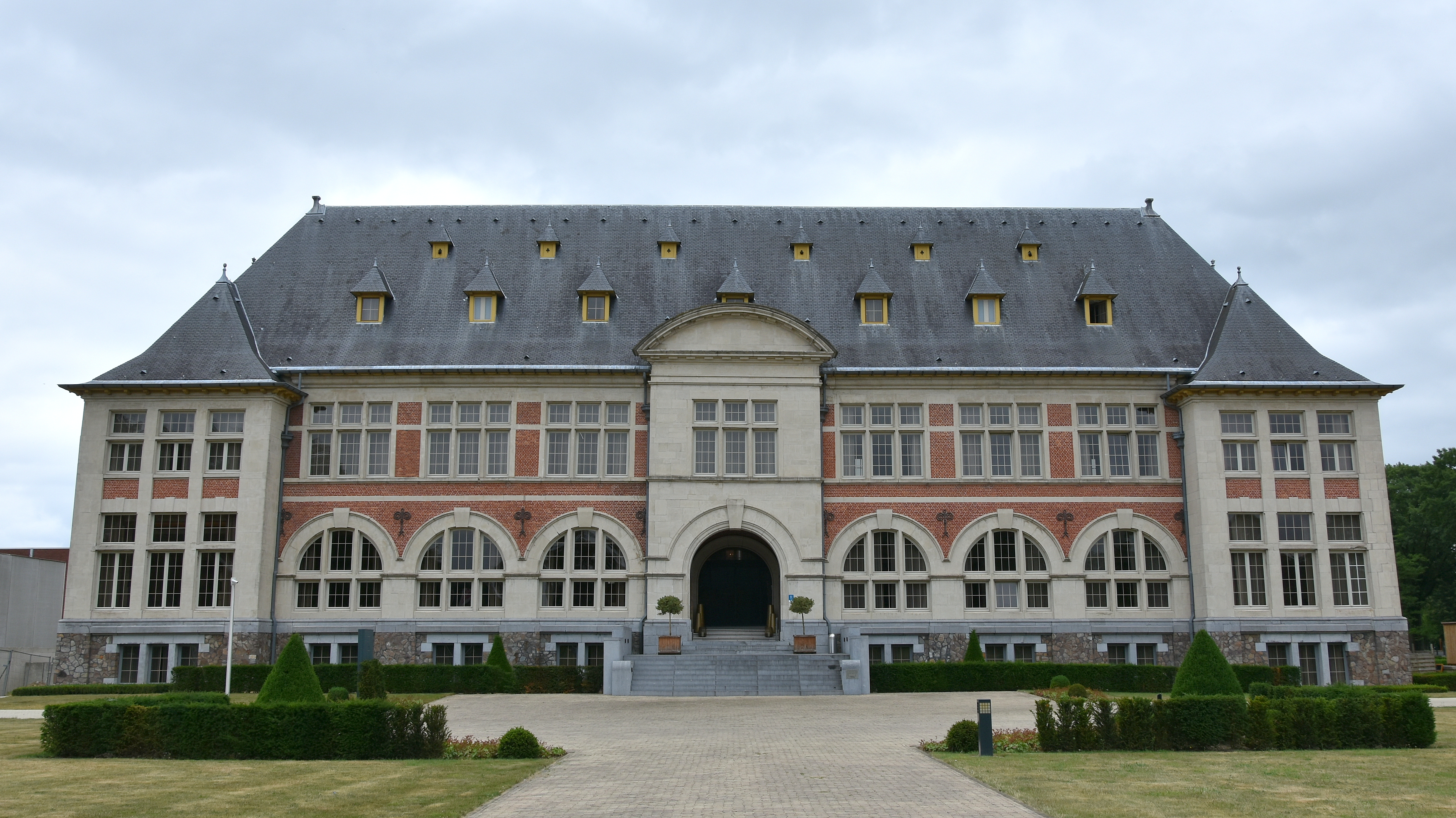 Hotel Terhills (directiegebouw steenkoolmijn van Eisden) 18-06-2018 This photo of immovable heritage has been taken in the Flemish Region